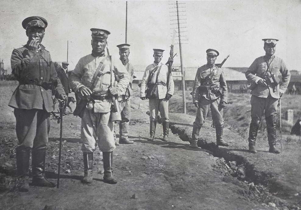 新軍軍官および兵士。